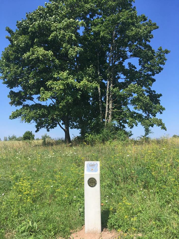 Buvusio Pajuodupės dvaro teritorija